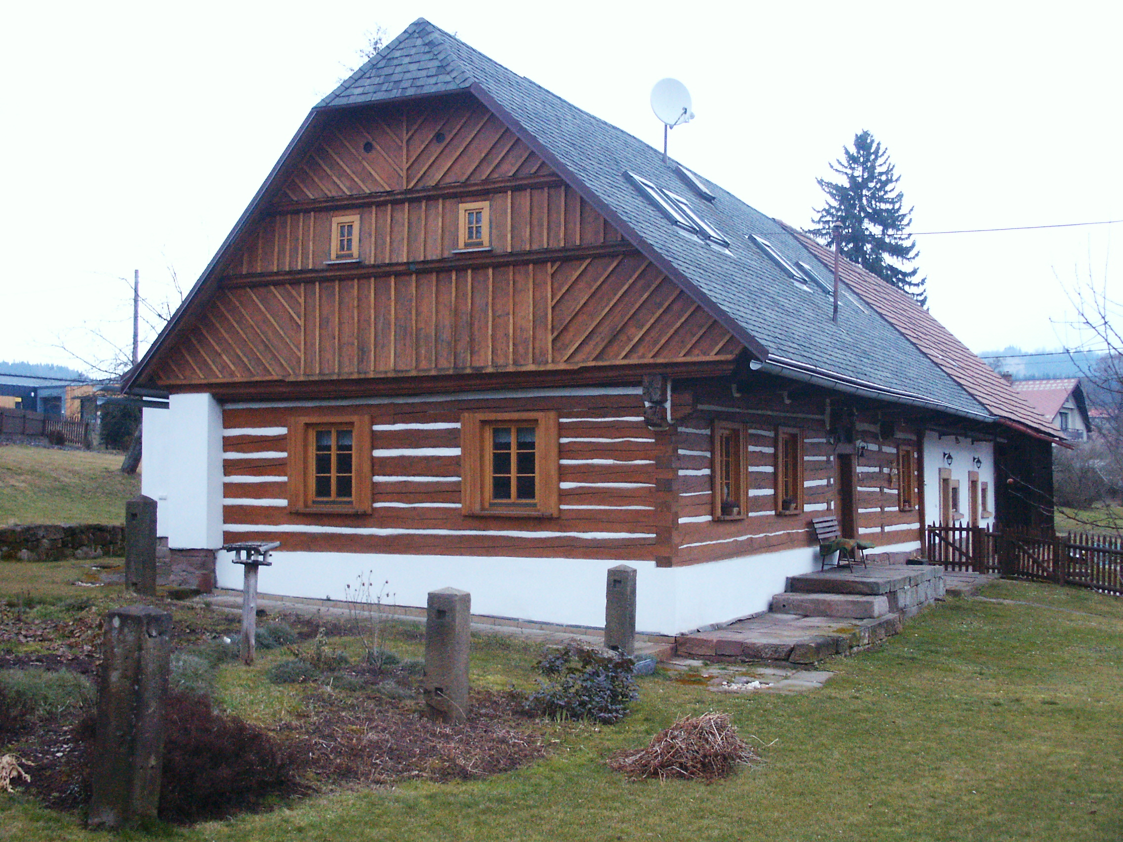 Vrchovina - č.p.5